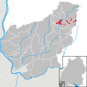 Schönau im Schwarzwald, Landkreis Lörrach, Baden-Württemberg